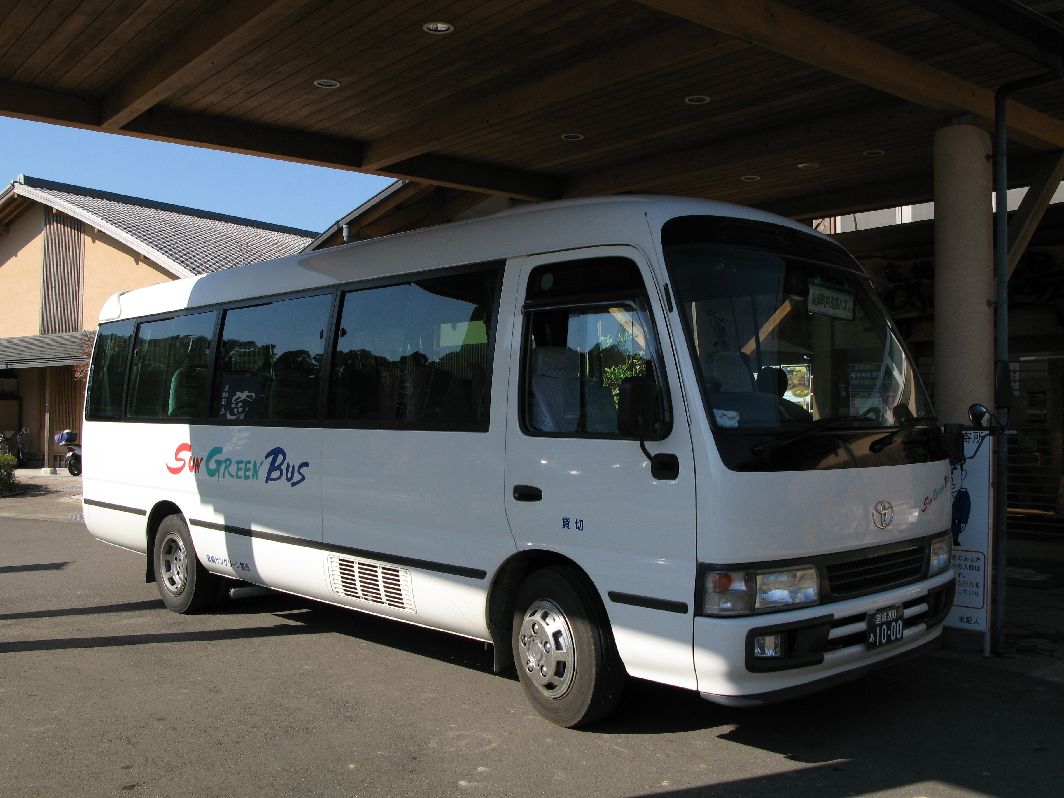 宮崎サングリーン観光 高鍋町内巡回バスの車両